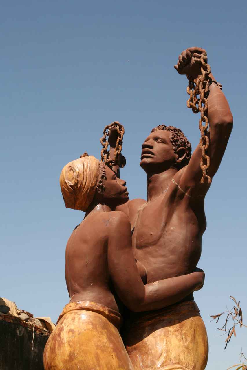 Mémorial de l'esclavage à Gorée